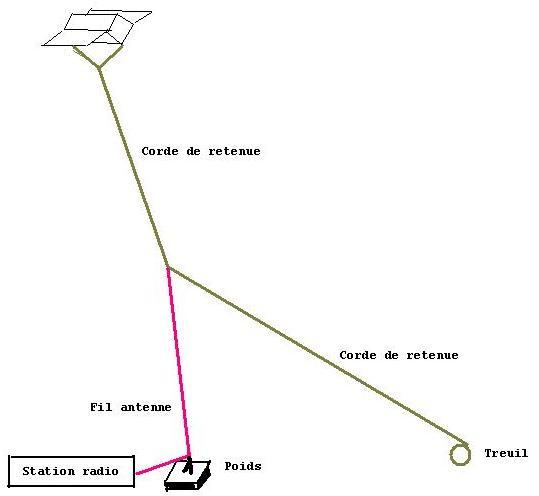 Cerf-volant porte antenne pour les radiocommunications.